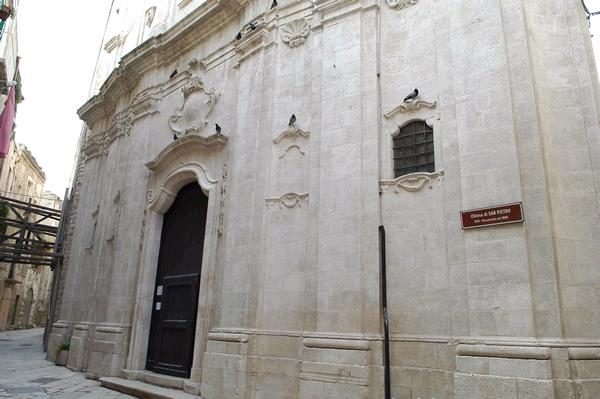 Chiesa di San Pietro a Molfetta.